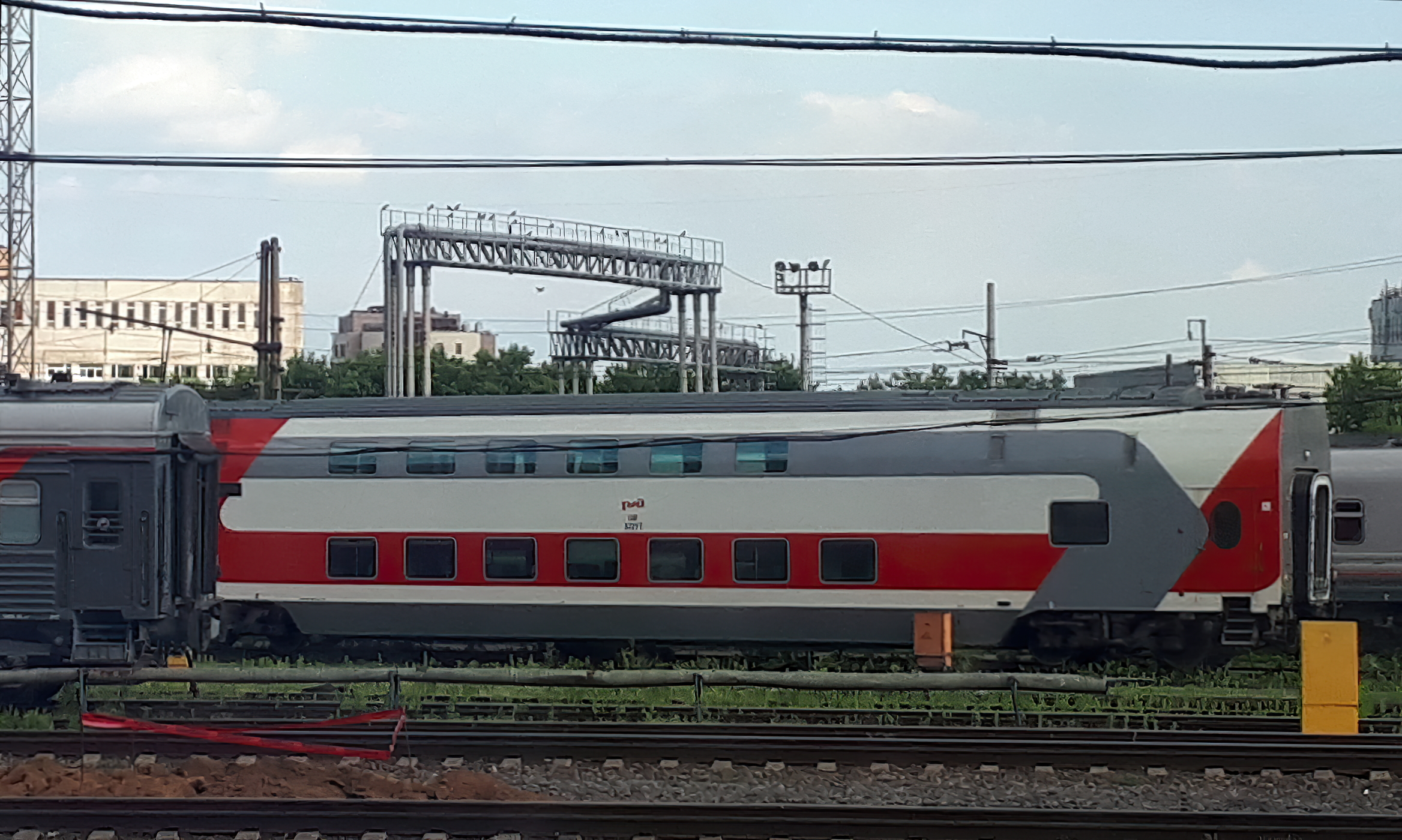 Двухэтажный "сидячий" вагон.